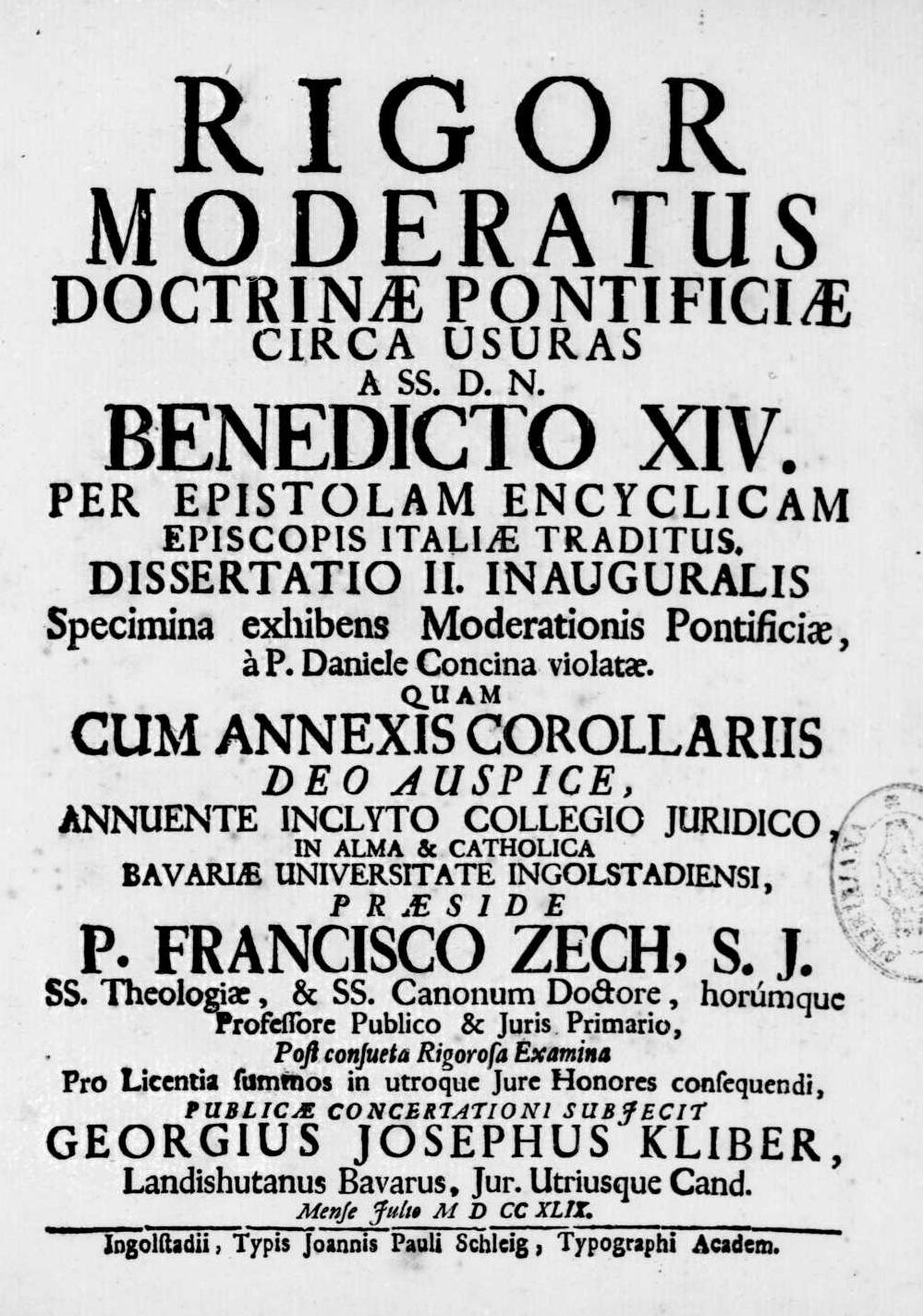 Frontespizio